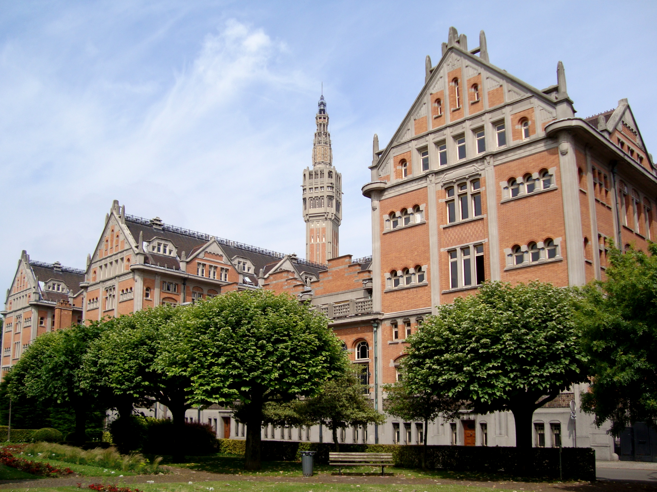 Vue arrière de l'hôtel de ville de Lille (Nord).